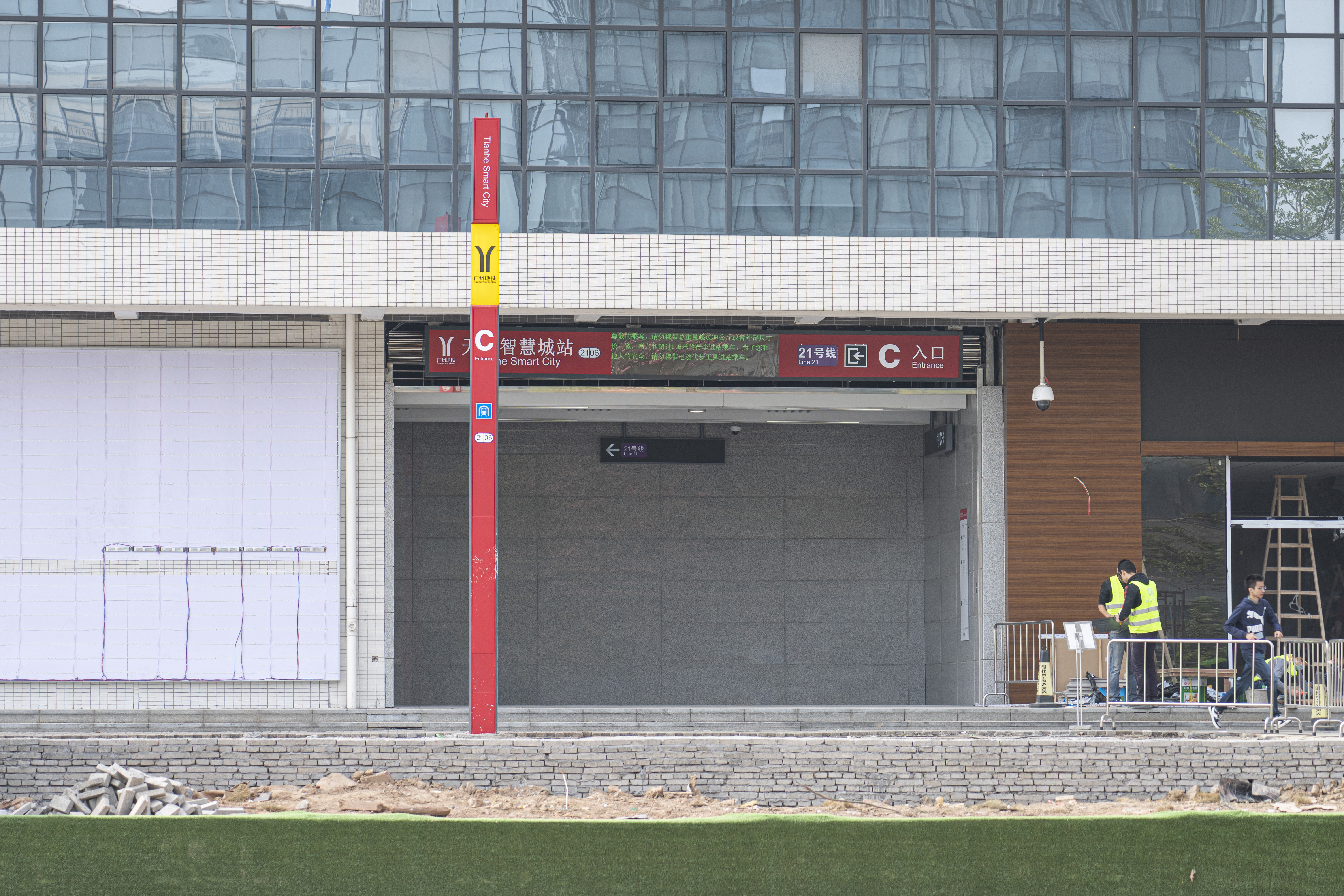 广州地铁天河智慧城站C出入口